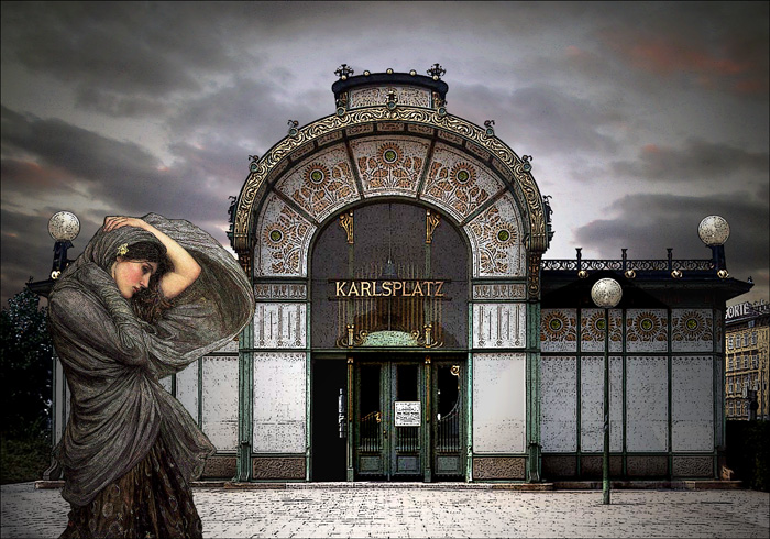 Karlsplatz, Wien - Vienna. Artwork by Heikenwaelder Hugo, Austria.